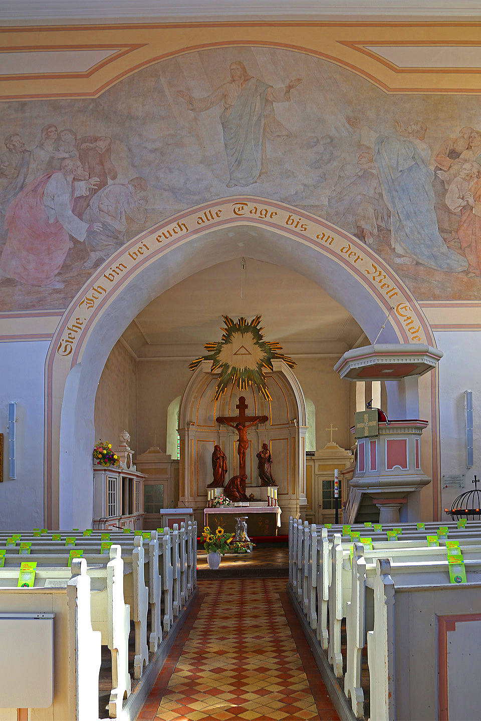 Pfarrkirche St. Marien in Waren. Eine einschiffige Saalkirche im neugotischem Stil.